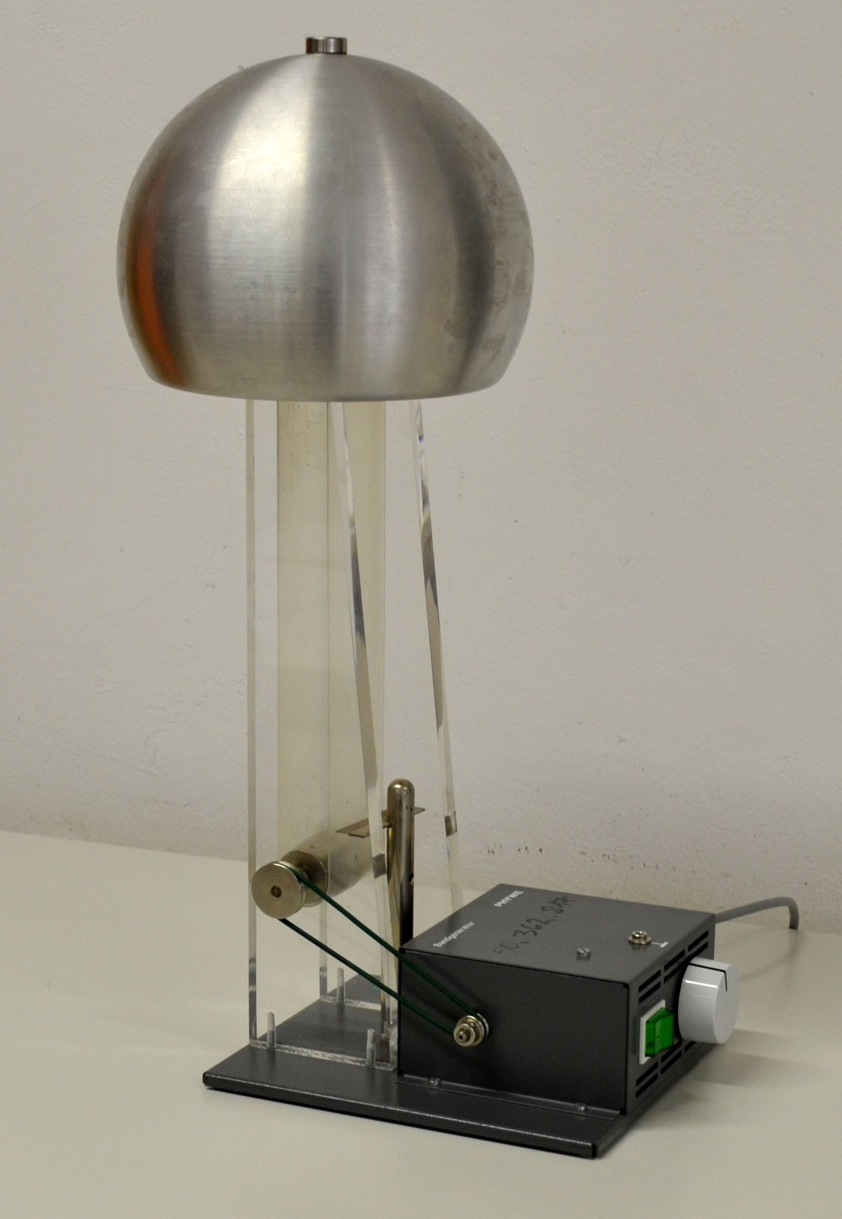 Bandgenerator